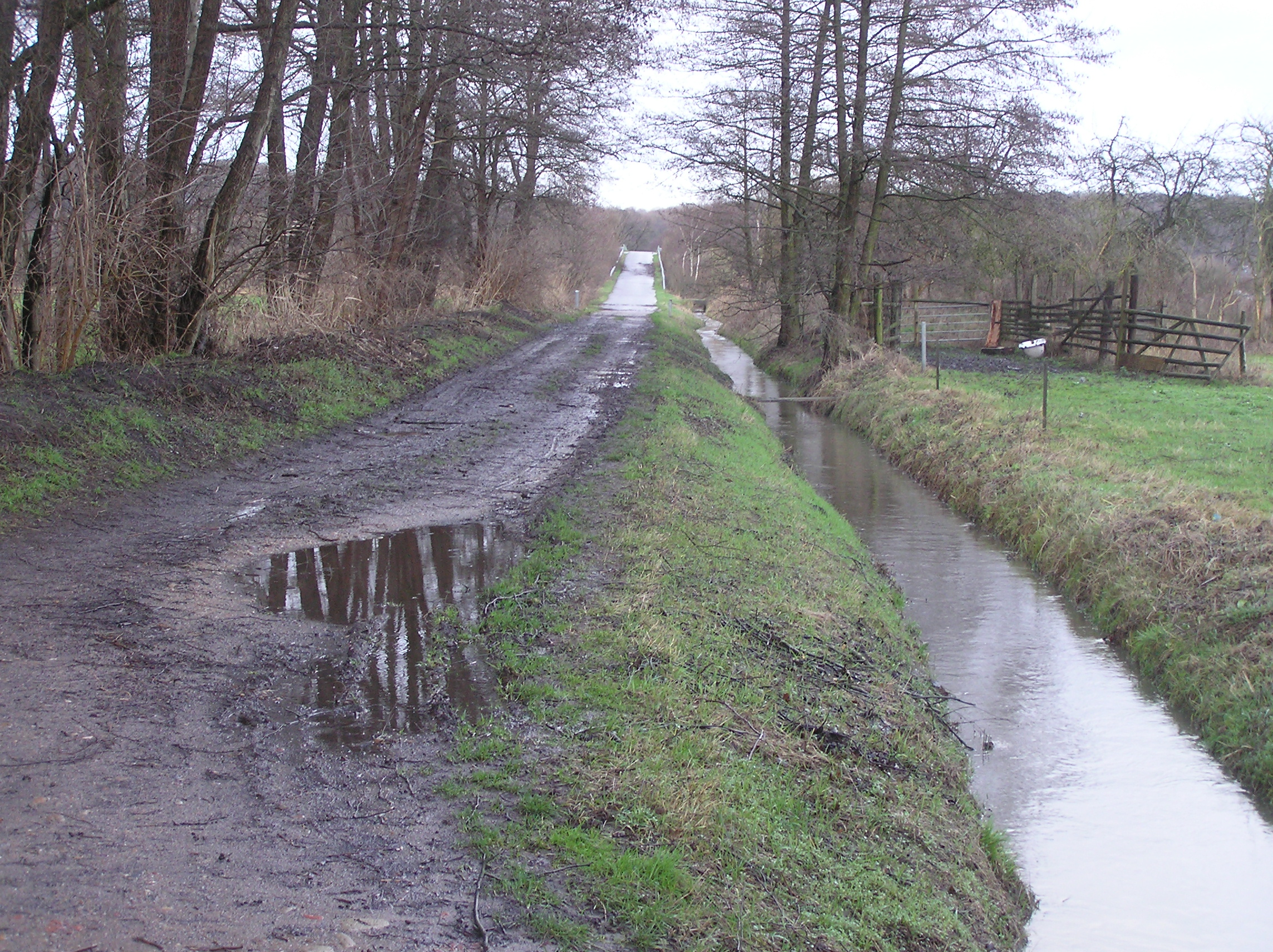 Dalbek Contents 1 batch 2 source 3 date 4 author 5 Licensing 6 Original upload log batch source Joachim Müllerchen date 28.01.2007 author Joachim Müllerchen